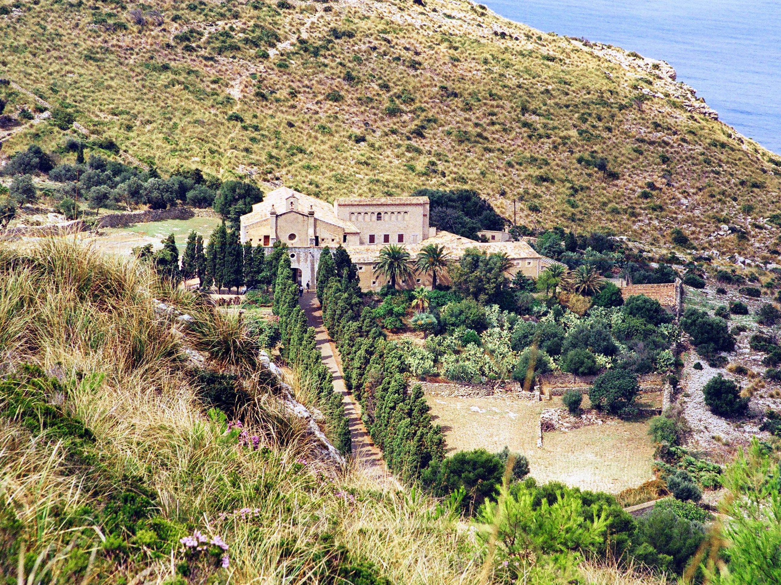 Ermita de Betlem, Àrta, Mallorca, Spain